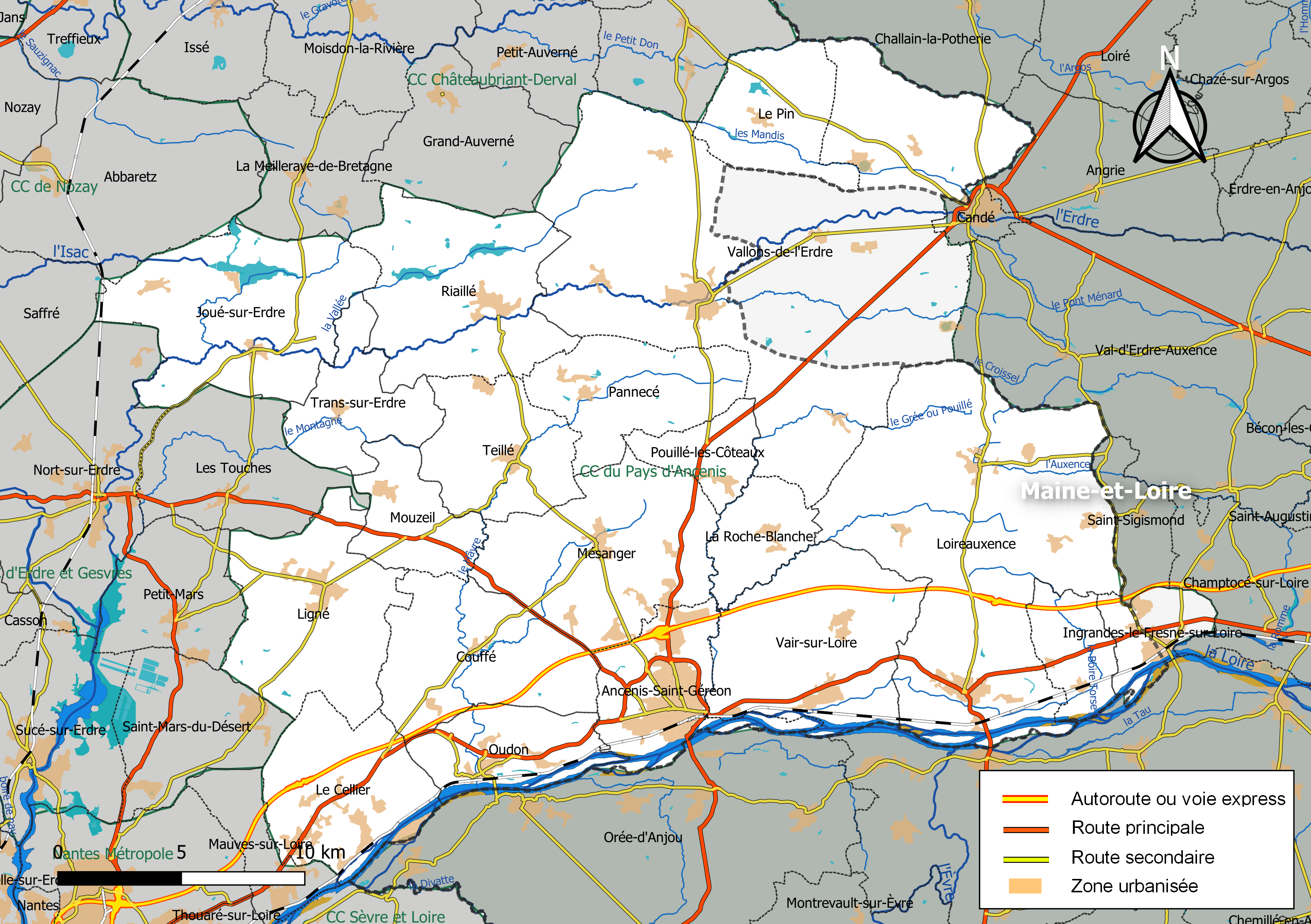 Carte géographique de la Communauté de communes du pays d'Ancenis, département de la Loire-Atlantique, France. Composition au 1er janvier 2019.